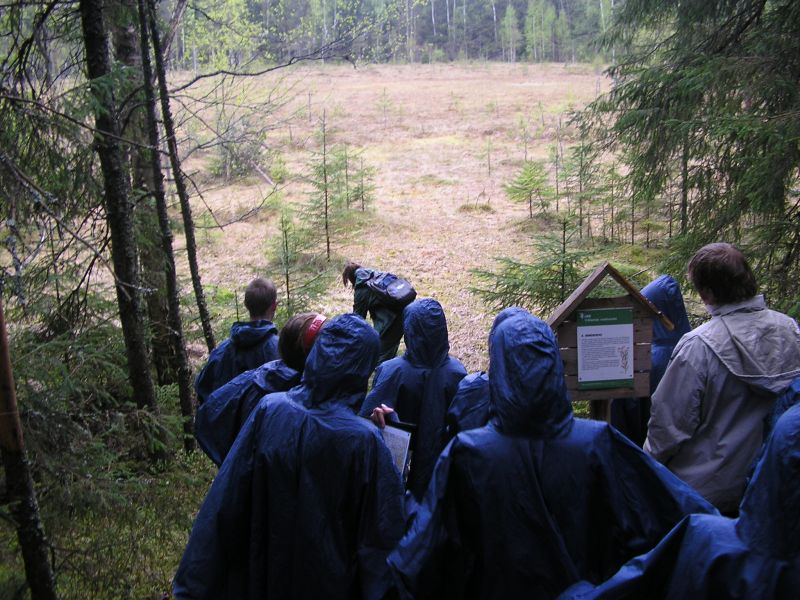 Vällamäe soo